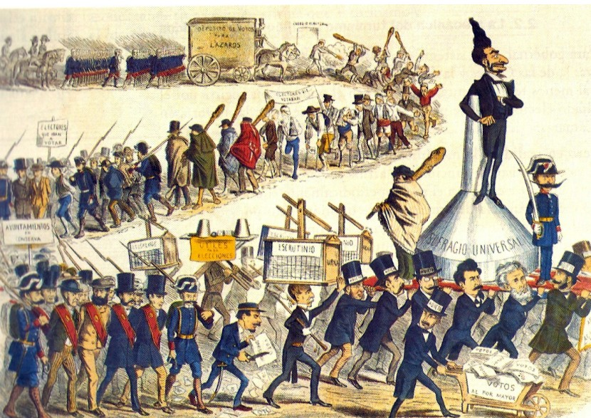 Viñeta de la revista La Flaca